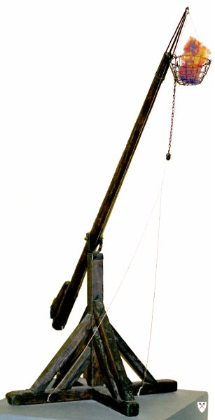 Żuraw garnek wulkana. Na bazie zdjęcia modelu. Zdjęcie z 2002r Autor: Topory Licencja: GNU FDL.